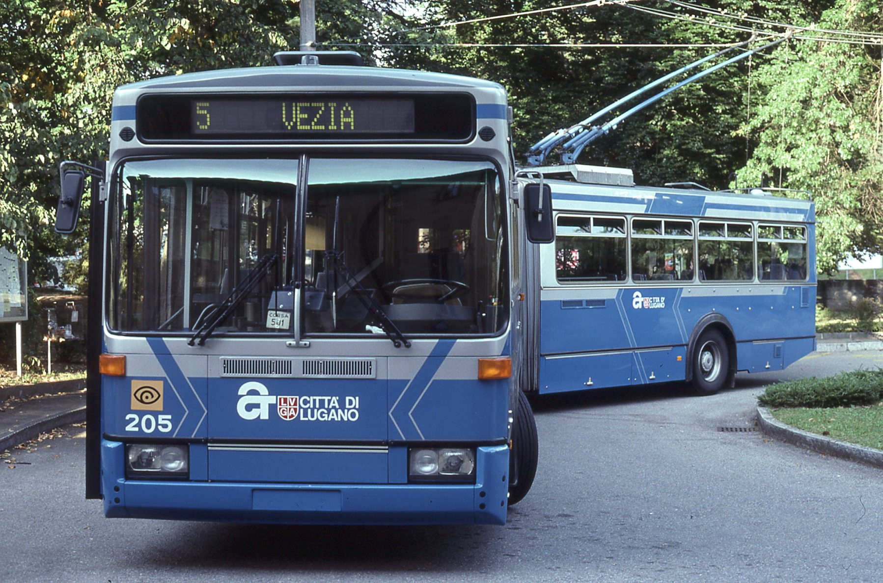 Vettura filoviaria 205 di Lugano in sosta al capolinea di Vezia